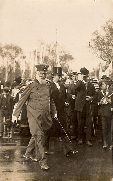 Bild zeigt König Ludwig III mit Georg Ritter von Breunig